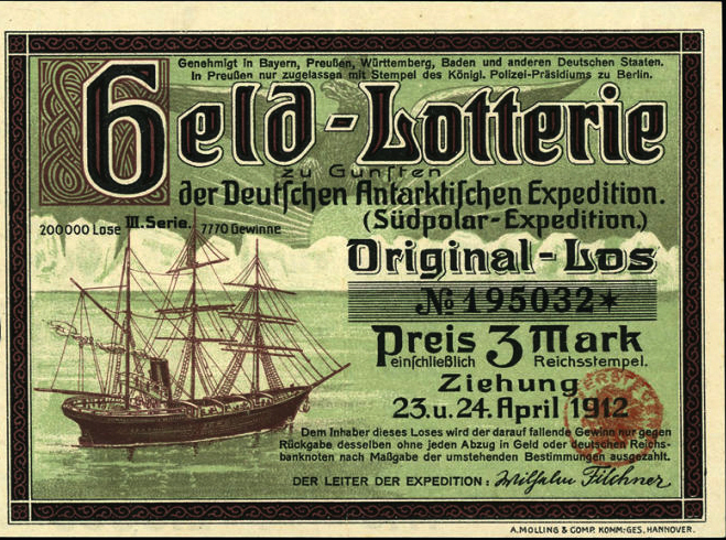 Lotterie-Los über 3 Mark einschließlich Reichsstempelder Geld-Lotterie - Ziehung 23. und 24. April 1912 - zu Gunsten der Deutschen Antarktischen Expedition (Südpolar-Expedition). Das Los mit der Nummer 195032 zeigt unter anderem links das Expeditionsschiff, den Dreimaster-Frachtsegler Deutschland auf offener See vor einer geschlossenen Eisbergwand im Hintergrund. Der Los ist mit der faksimilierten Unterschrift des Expeditionsleiters Wilhelm Filchner versehen, darunter der Schriftzug der Druck- und Verlagsgesellschaft A. Molling & Comp. Komm.-Ges. in Hannover ...